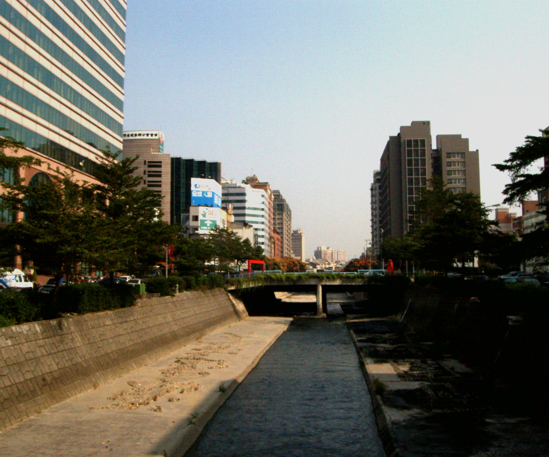 台中市華美西街一景